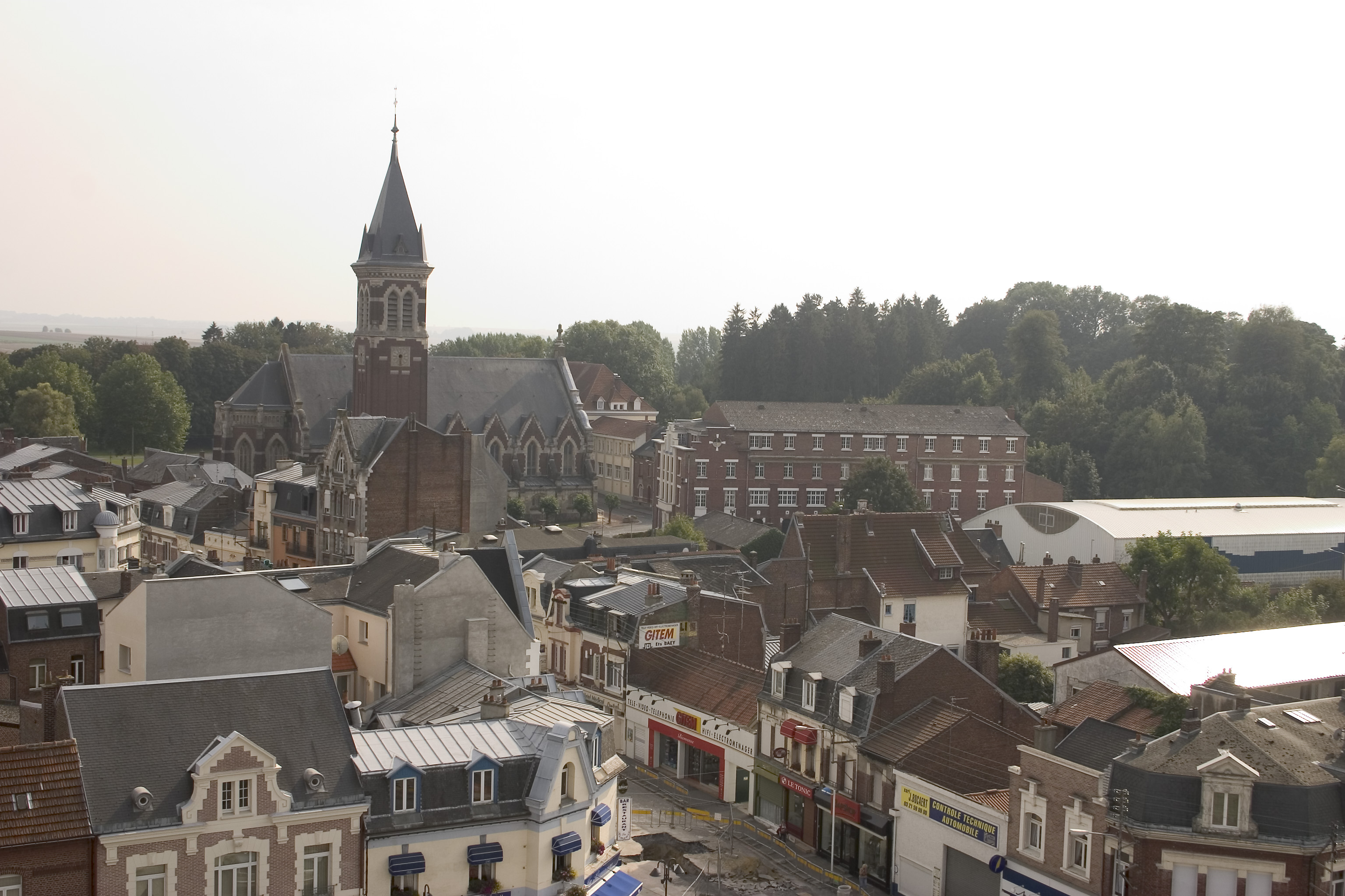 Bapaume l'église vue du beffroi